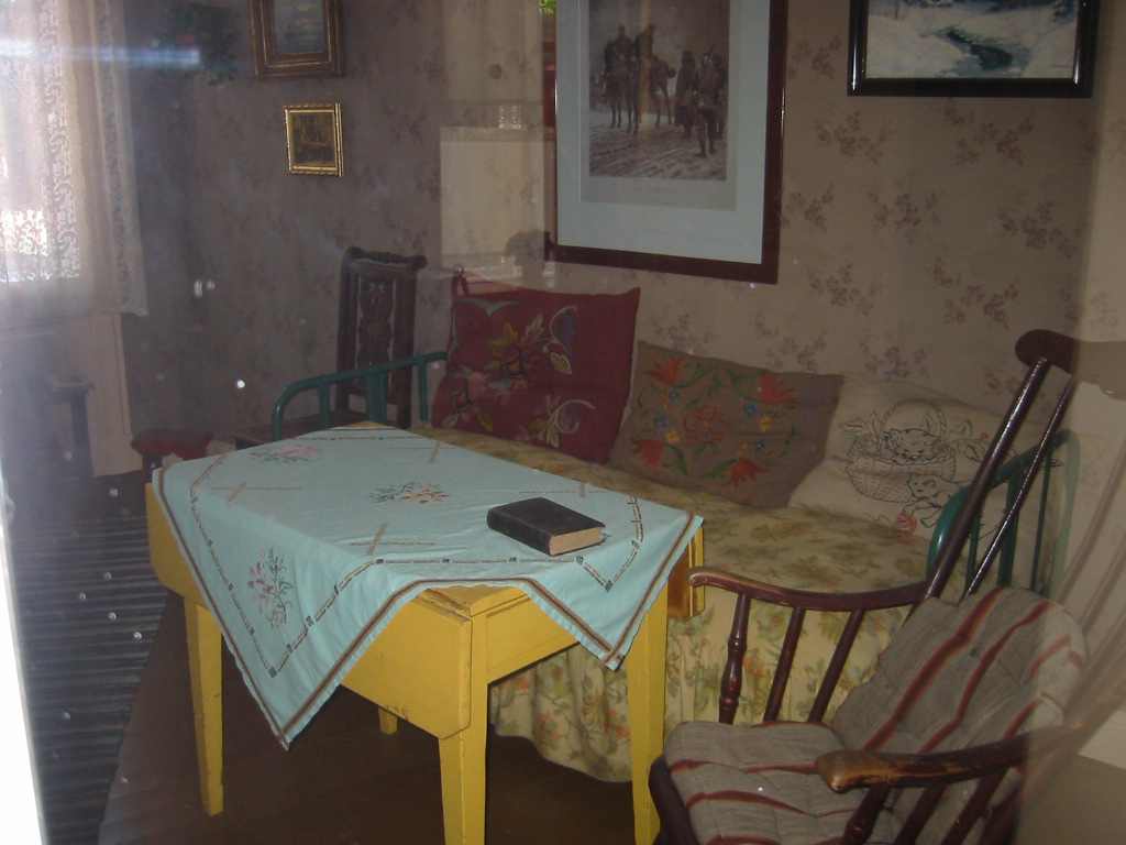 Norsk folkemuseum Oslo, Utstillingen «Vaskekonen Gunda Eriksens hjem»